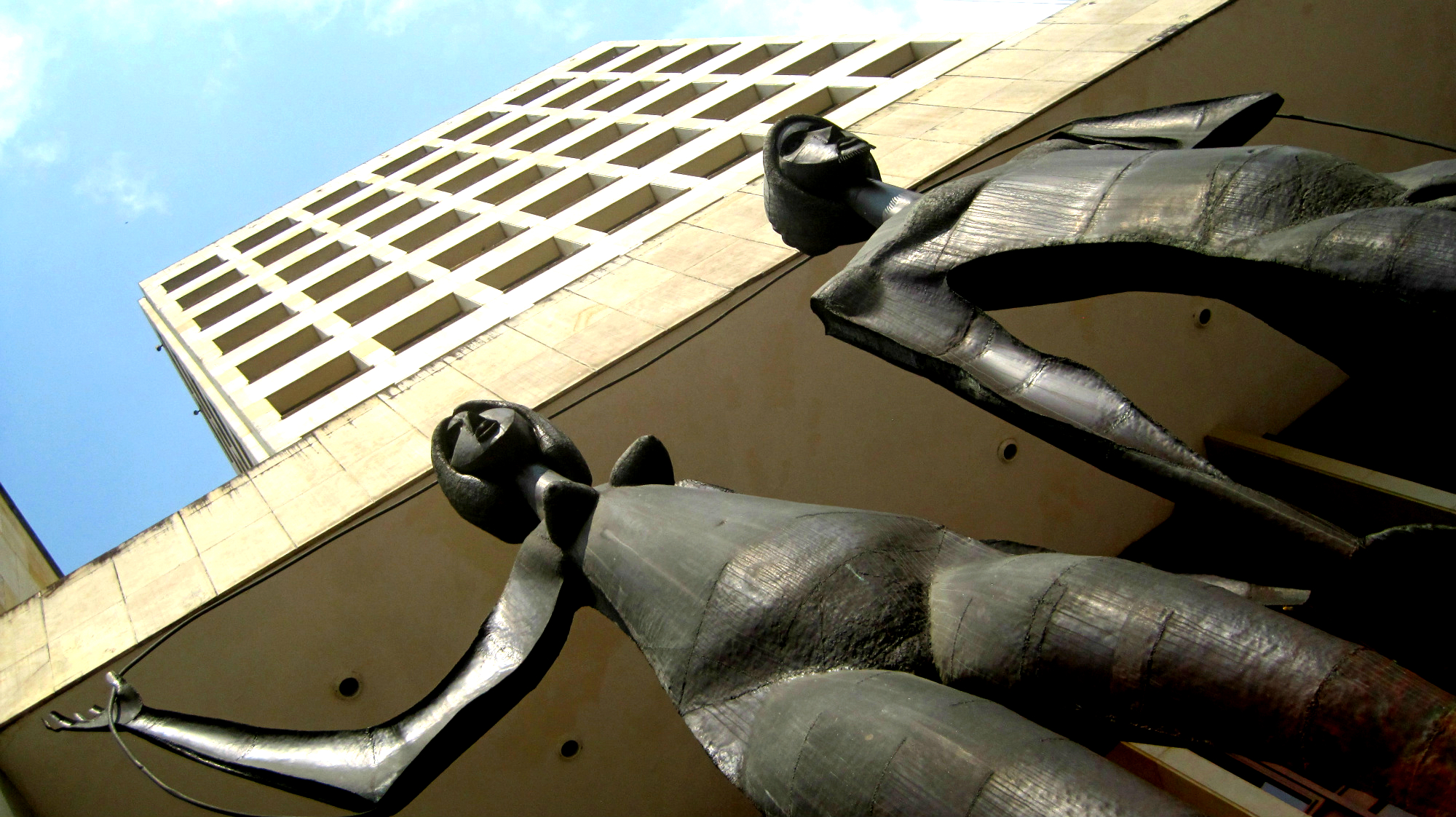 Escultura ubicada en la Plaza de Bolivar